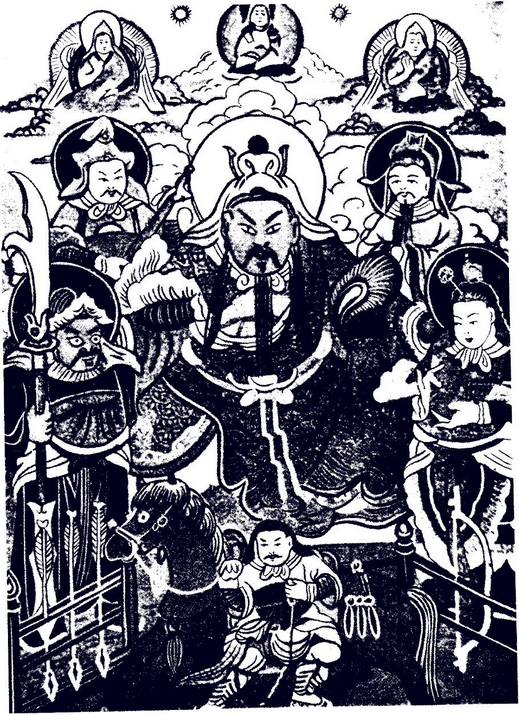 Гэсэр-хан.